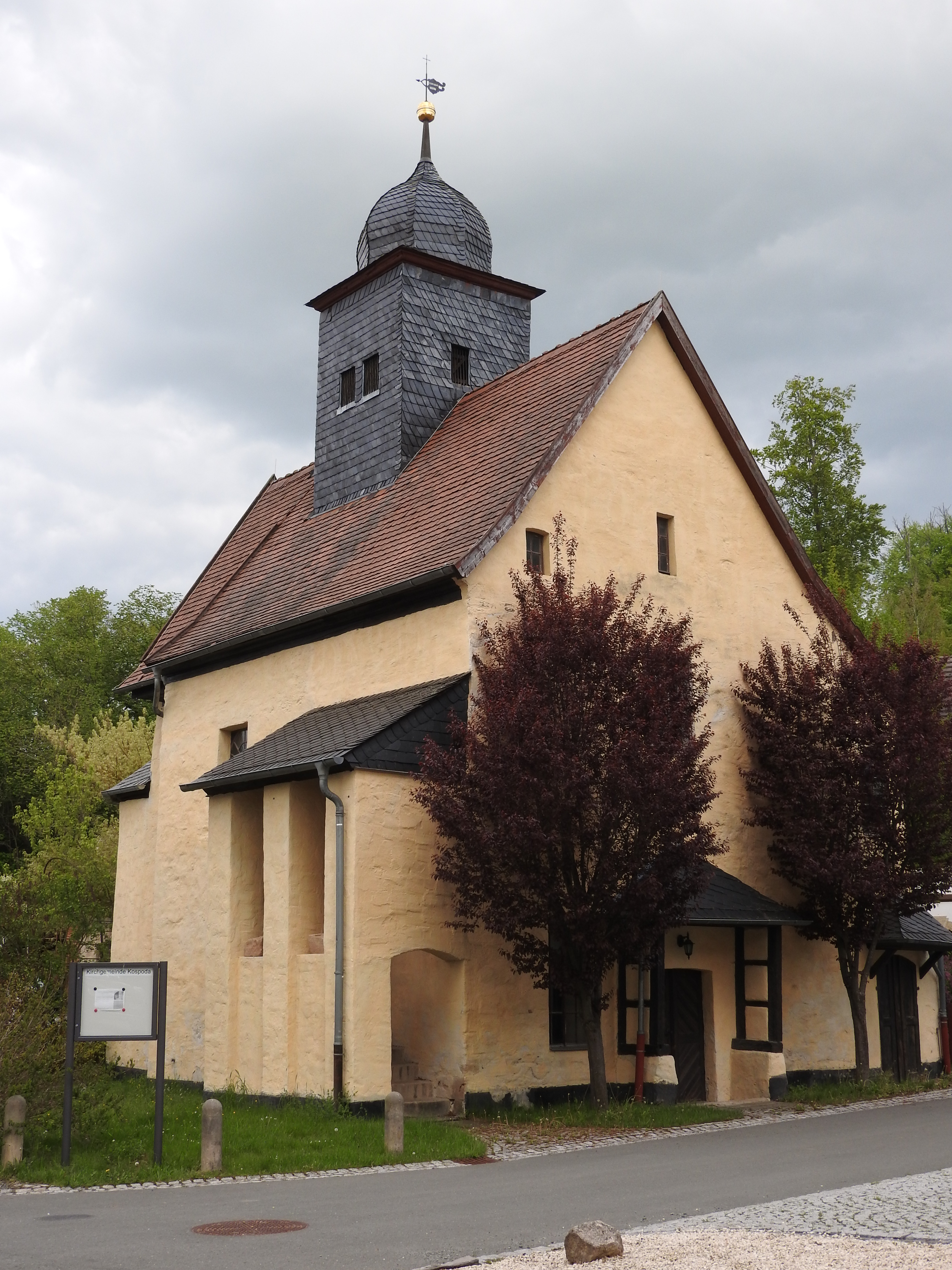 Kirche in Kospoda, Thüringen